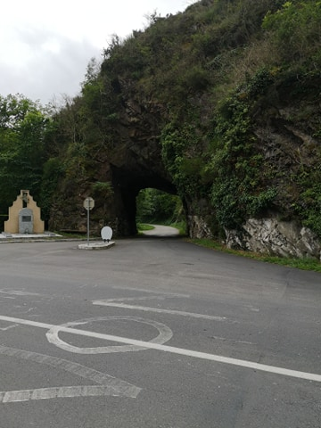 La porte de Kercabanac, sur la commune de Soueix-Rogalle en Ariège, en juin 2020.